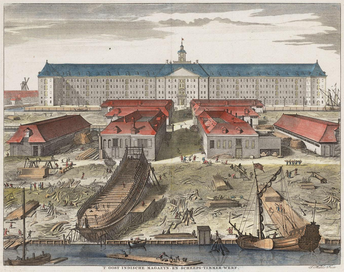 Kopergravure. Met de hand ingekleurd. Afbeelding van het Oost-Indisch Magazijn en de scheepswerf. Opschrift: T OOST INDISCHE MAGAZIJN. EN SCHEEPS-TIMMERWERF TE AMSTERDAM'.